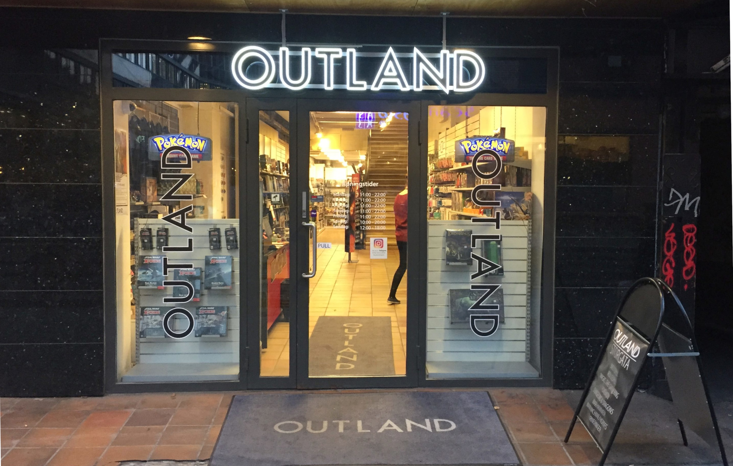 Butikken Outland i Storgata 26 i Oslo.